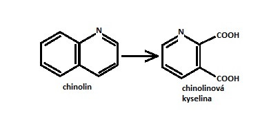 Oxidace chinolinu za vzniku chinolinové kyseliny.